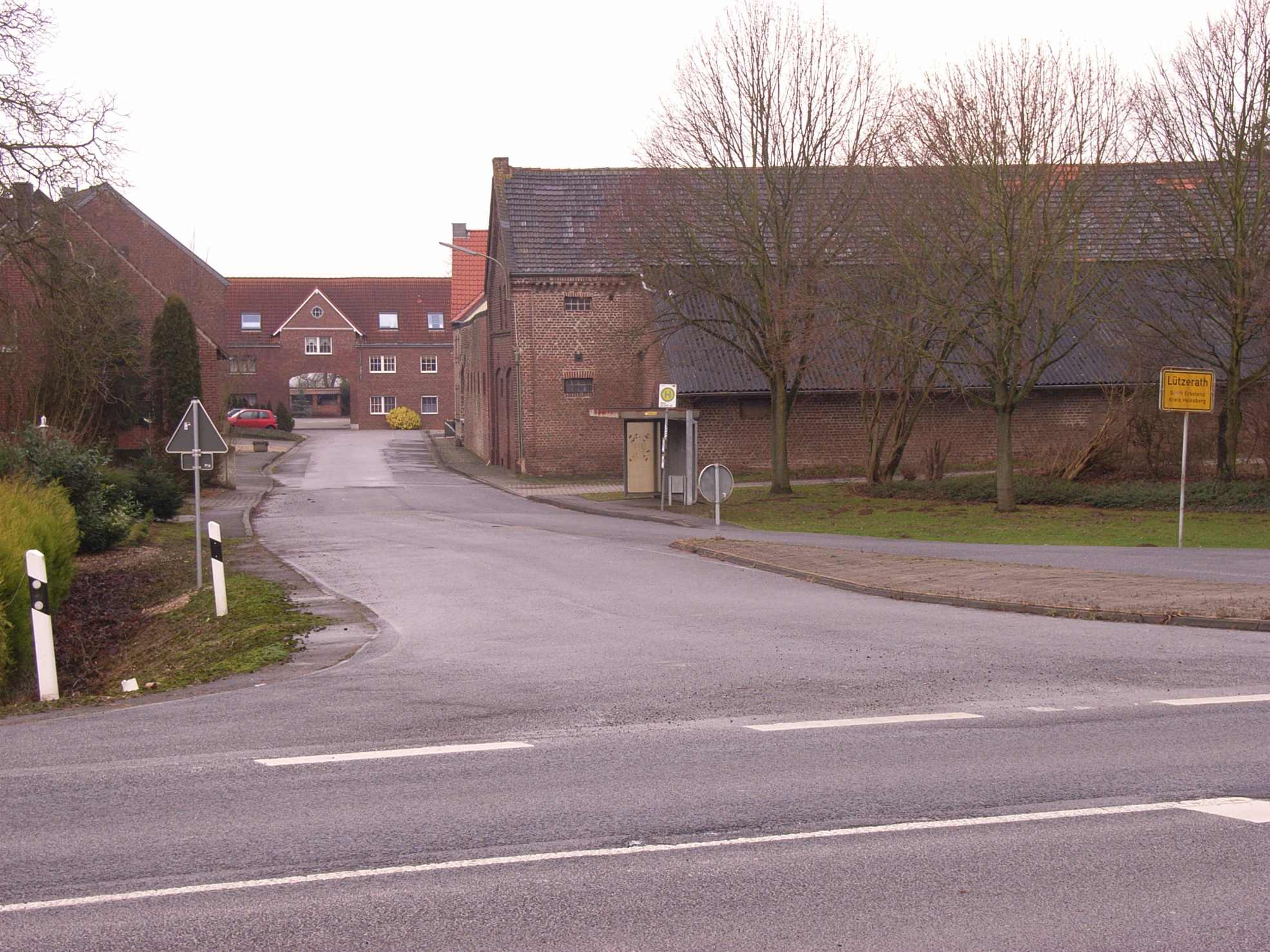 Erkelenz-Lützerath, NRW